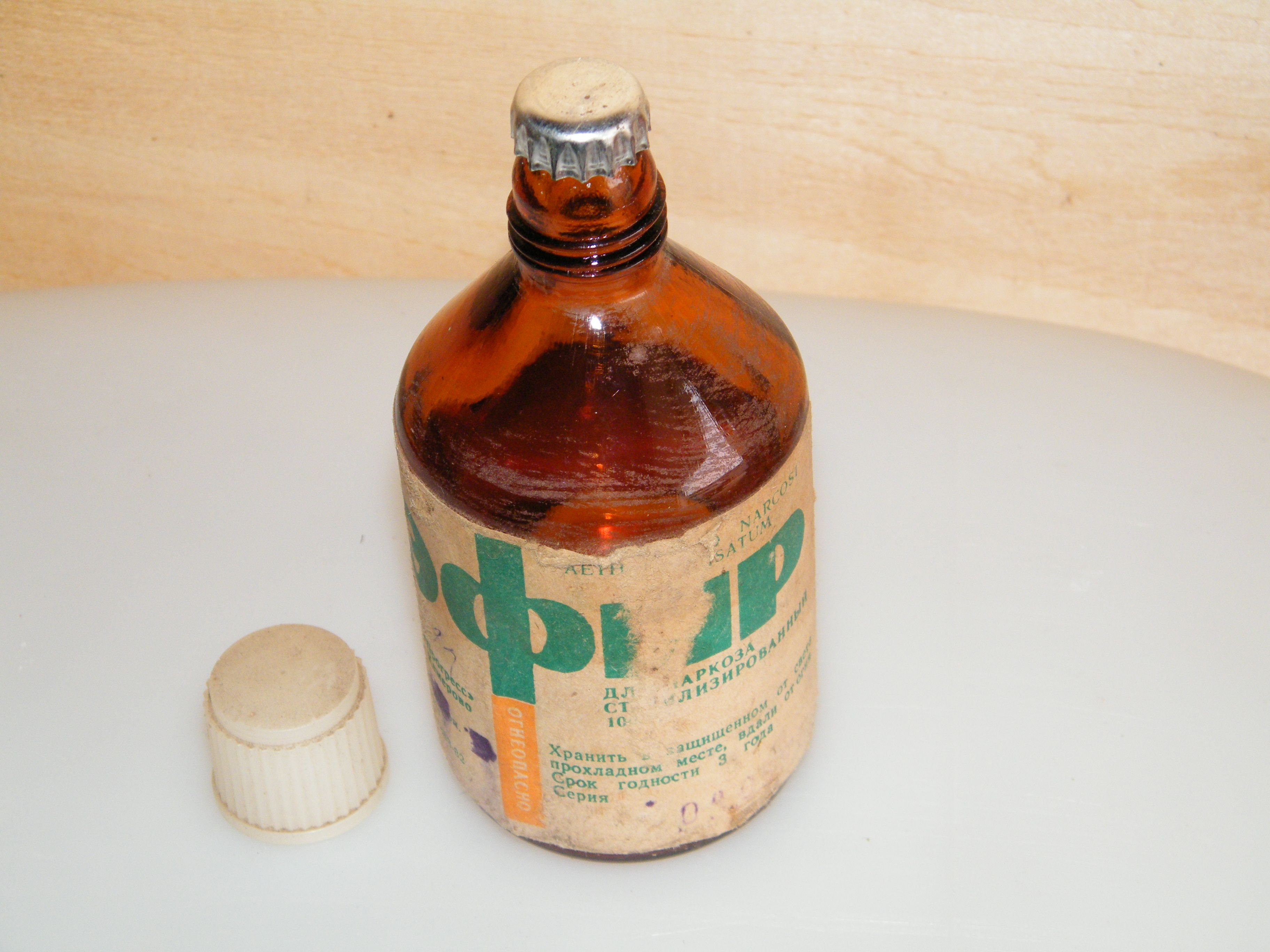 Эфир для наркоза в бутылке, 1980-е годы цена 50 копеек